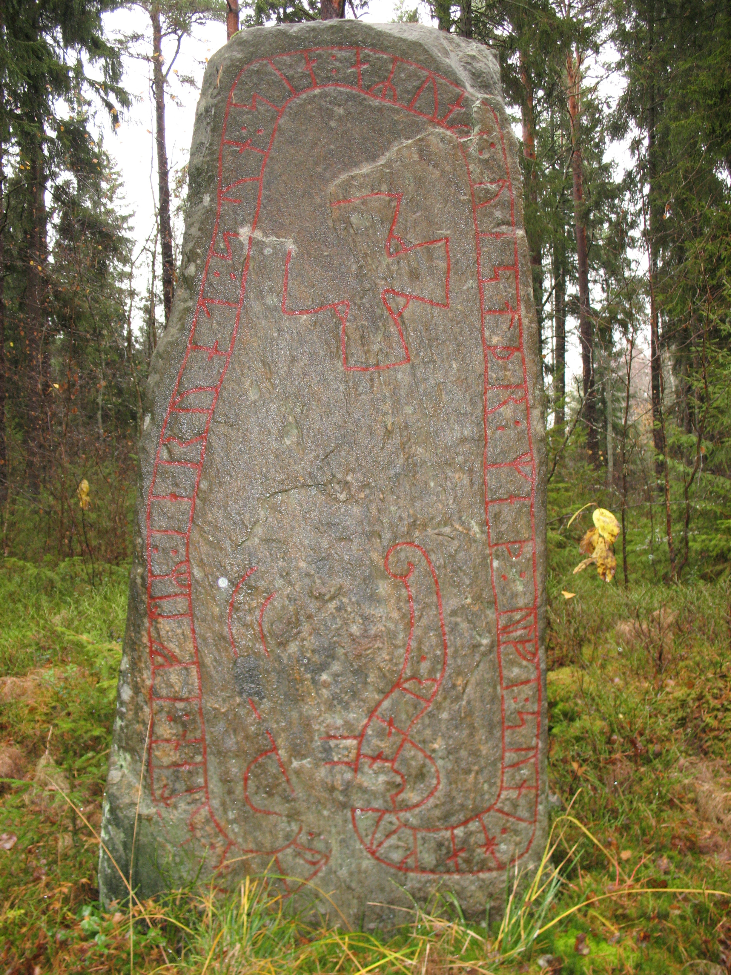 Runestone Sö 260